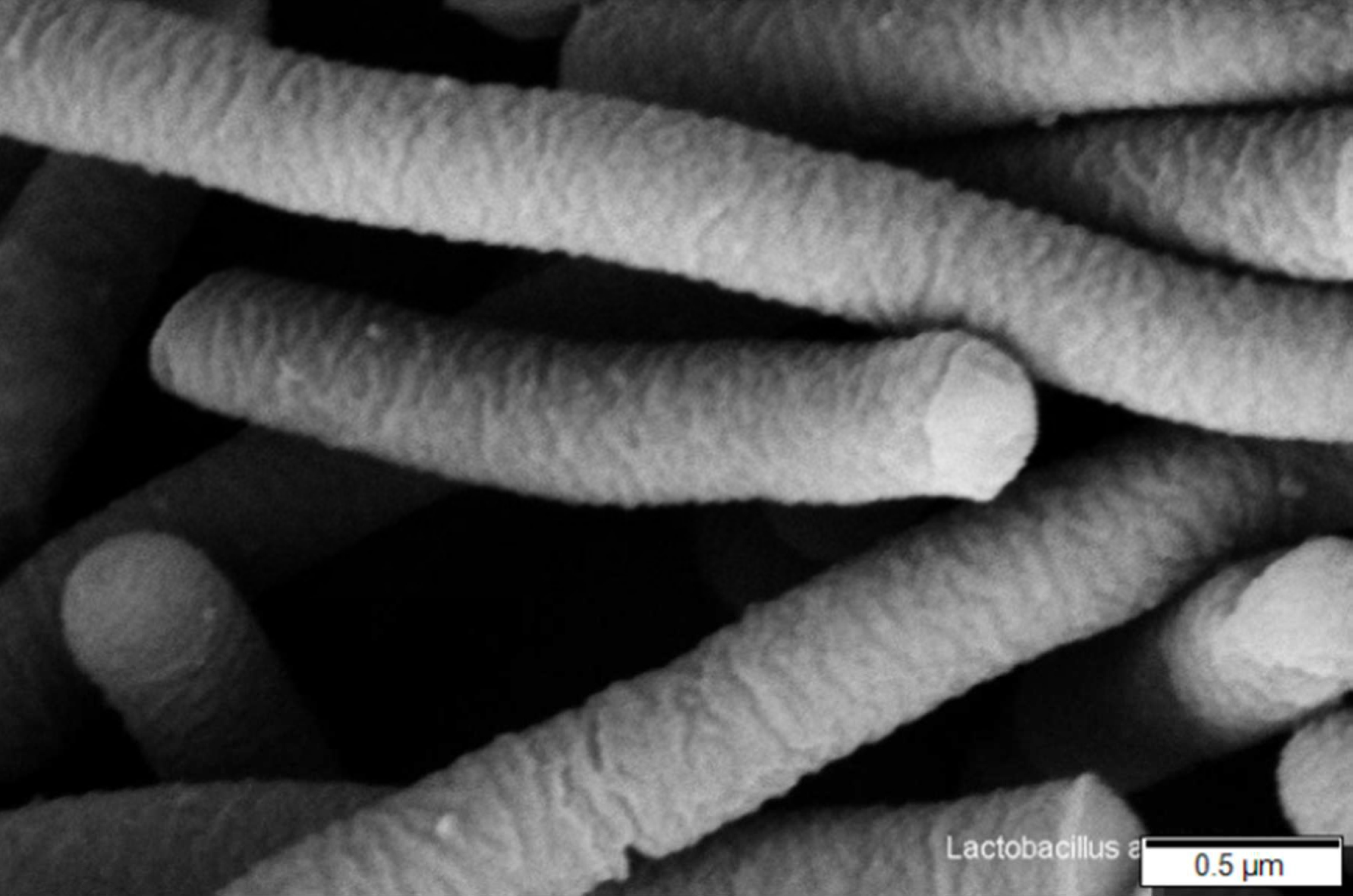 Lactobacillus acidophilus, SEM image